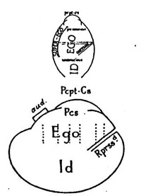 Fig. 2. Diagramma di Freud riguardante la struttura gerarchica della mente: Id: inconscio; Ego: Io: Super-Ego: Super-Io.